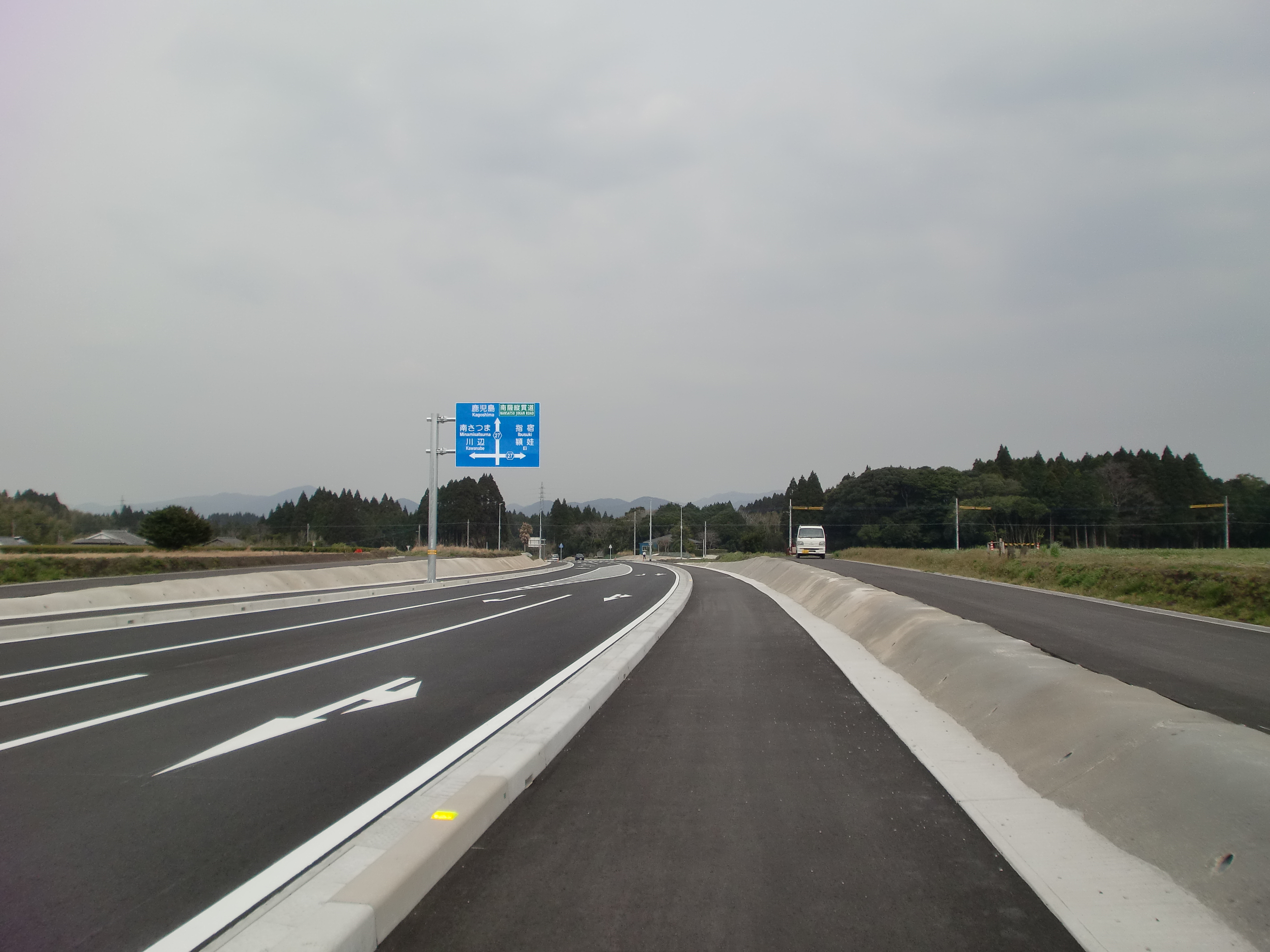 南薩縦貫道の瀬世交差点の遠望。枕崎方面から鹿児島方面を望む